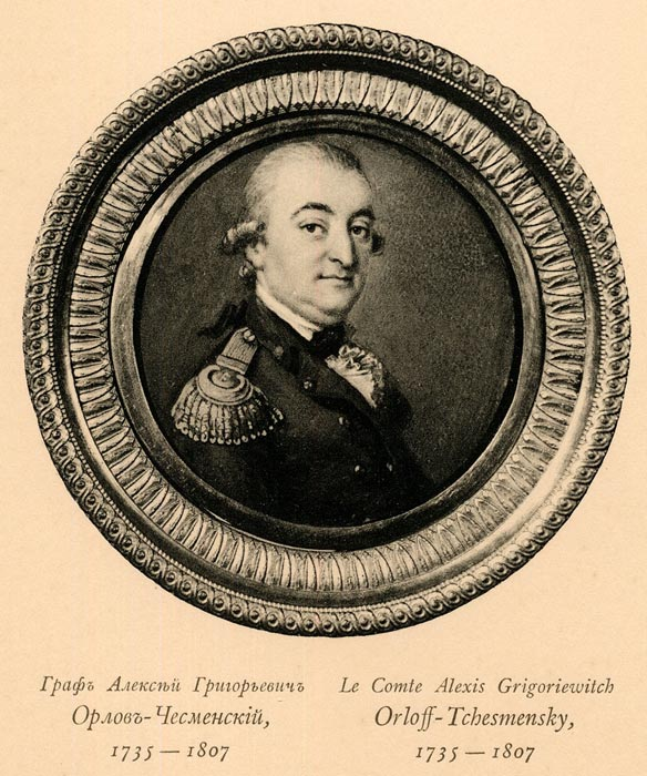 Алексей Орлов-Чесменский